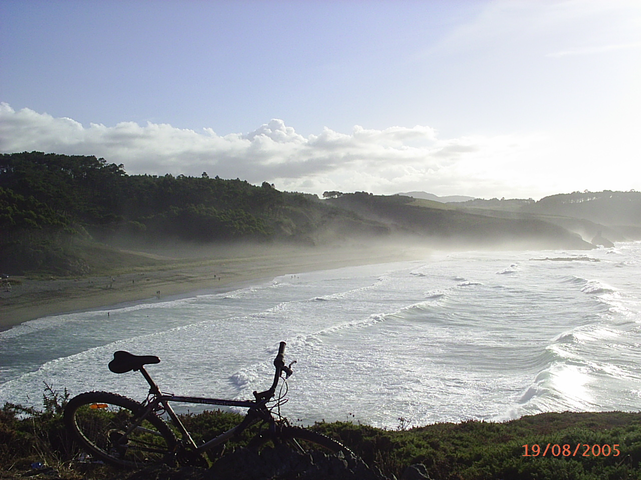 Playa de Frejulfe en Asturias